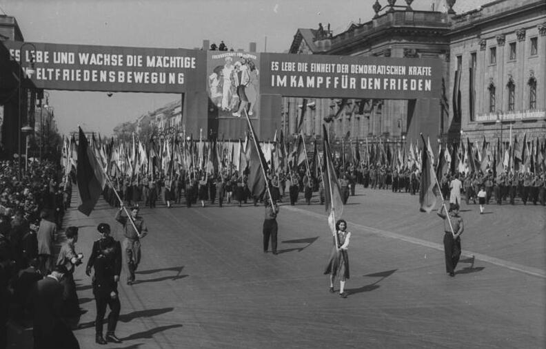 Berlin, Mai - Demonstration Zentralbild/Quaschinsky 1. Mai 1950 in Berlin Im Berliner Lustgarten wurde eine große Maikundgebung durchgeführt. UBz: die FDJ an der Spitze des Demonstrationszuges auf der Straße Unter den Linden